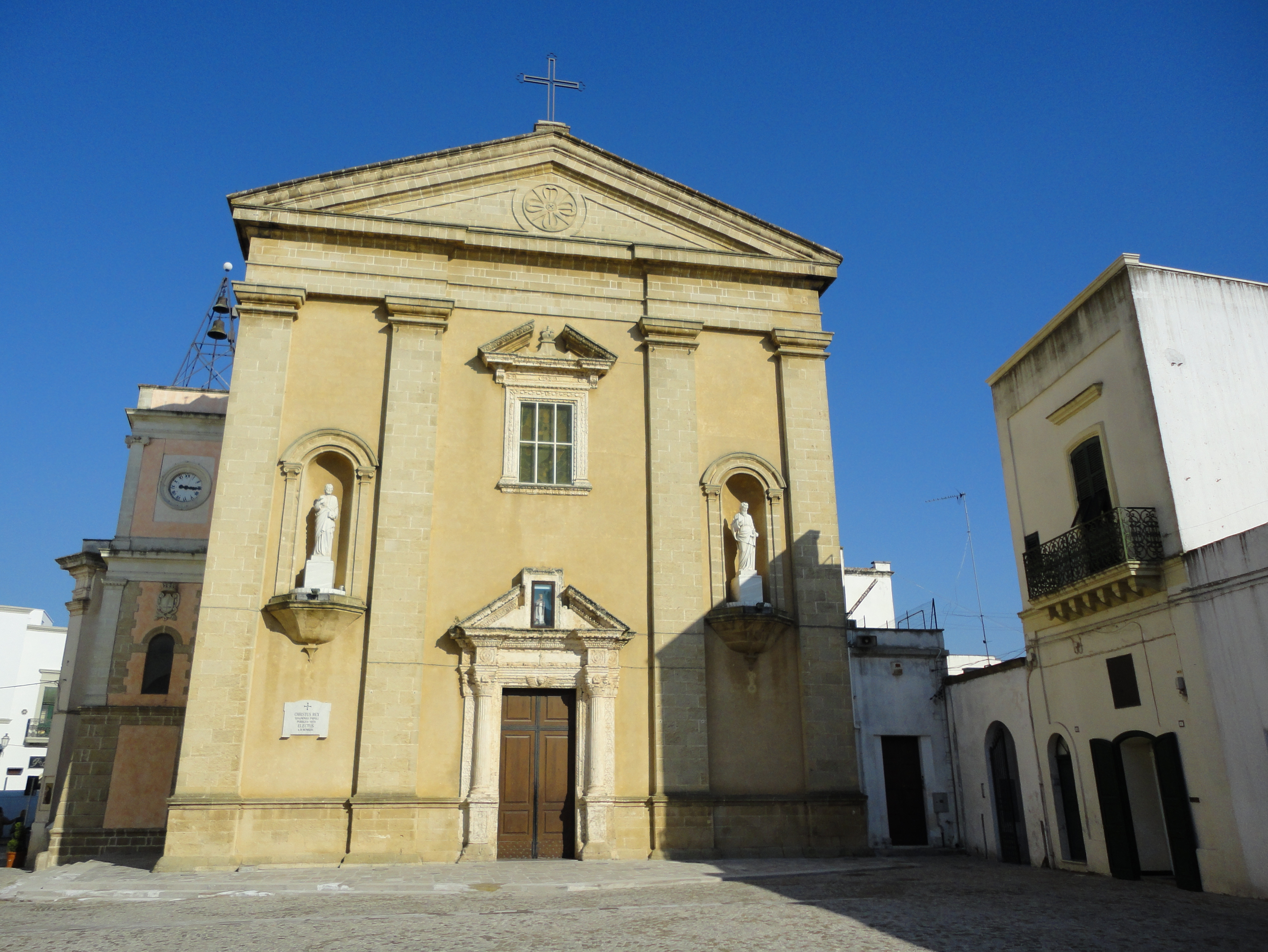 Chiesa San Martino Taviano, Lecce